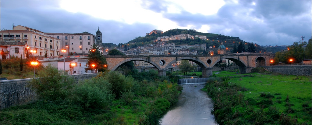 Descrizione: il fiume Crati nella città di Cosenza. Fonte: Valentina Blasi (io) Data: 11 novembre 2007, 5:55:14 PM Autore: Valentina Blasi (io) Licenza: Detentore copyright: opera propria